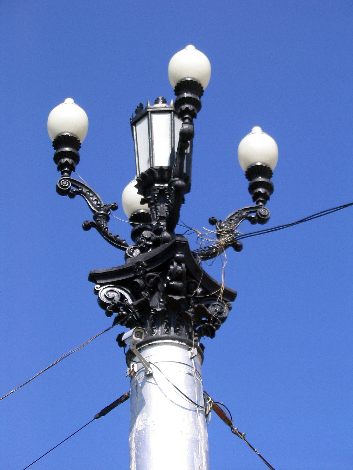 Фонарь на Театральном мосту (Площадь Пушкина (Иваново))